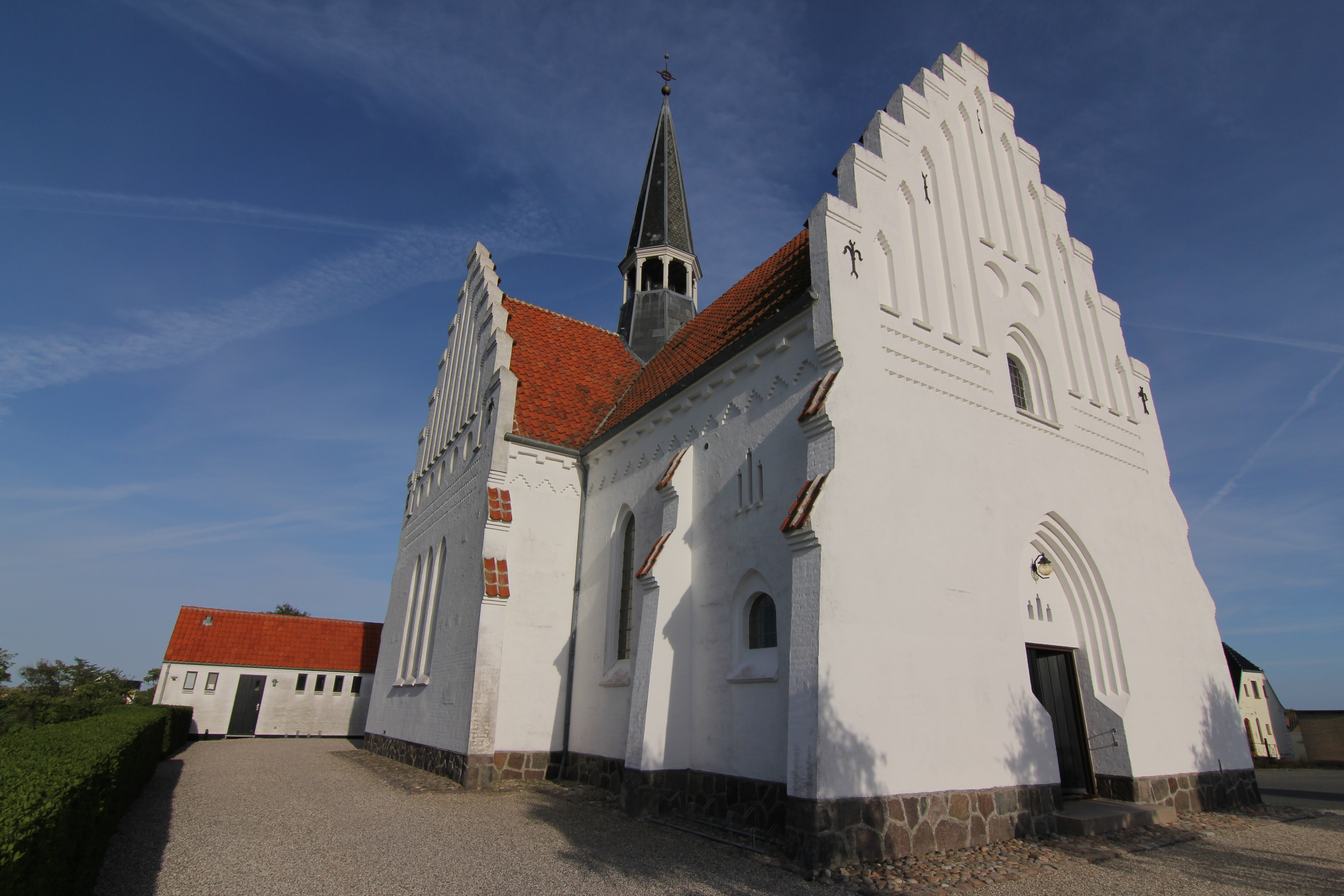 Bagenkop Kirke i Bagenkop Sogn i Langeland Provsti